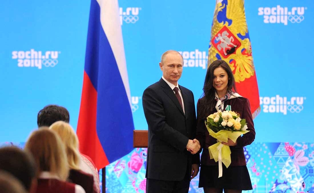 Орденом Дружбы награждена олимпийская чемпионка и бронзовый призёр Олимпийских игр в фигурном катании Елена Ильиных.